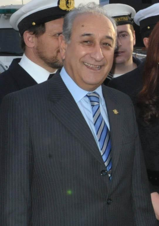 Arturo Puricelli en 2011